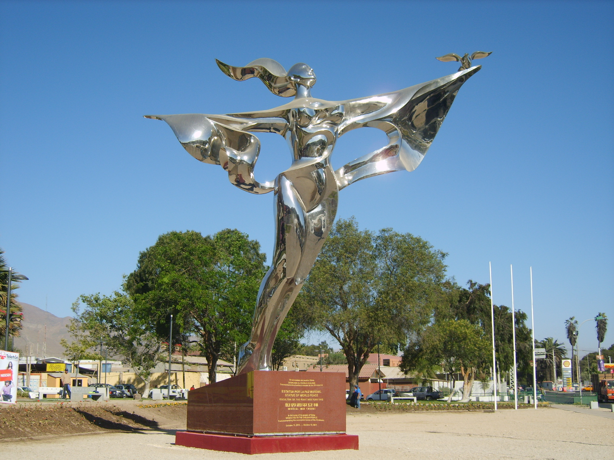 Diosa de la Paz